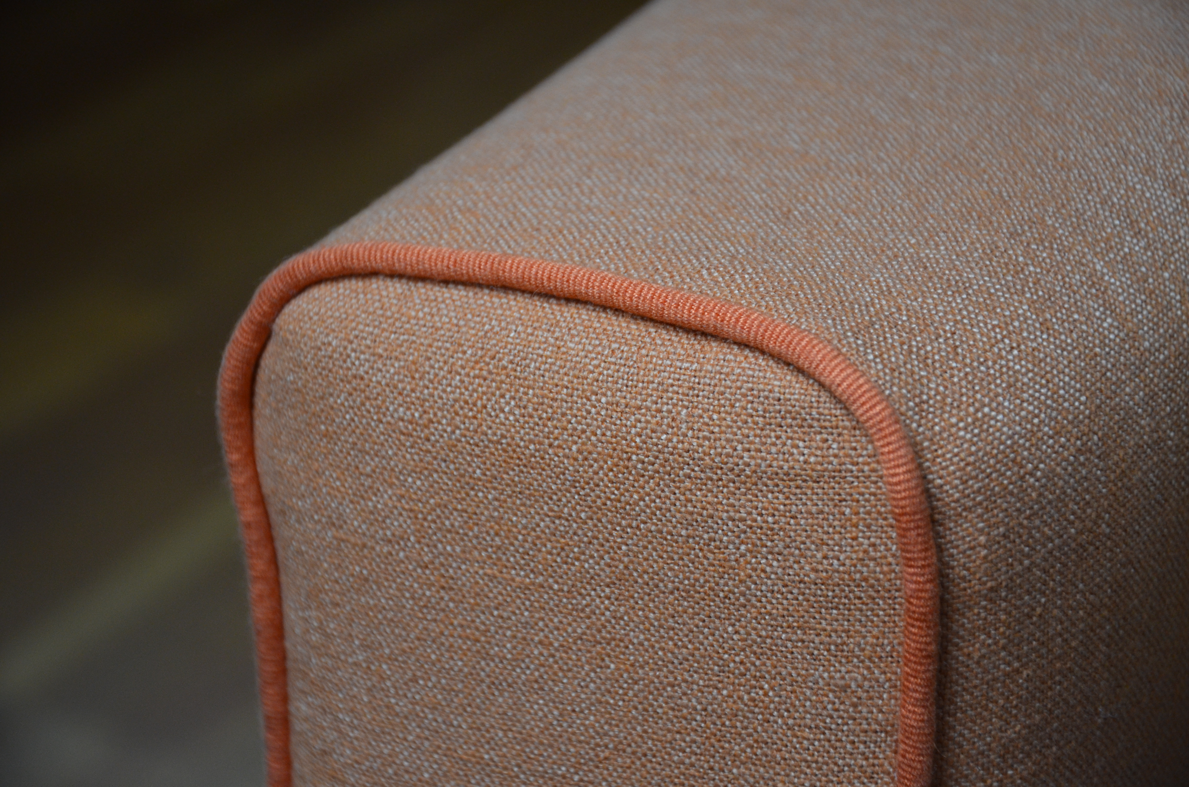 Passepoil